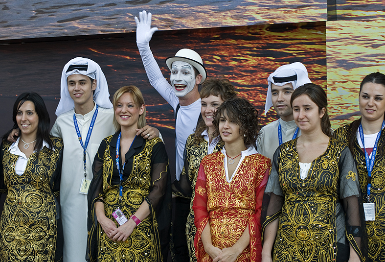 Azafatas del pabellón de kuwait.